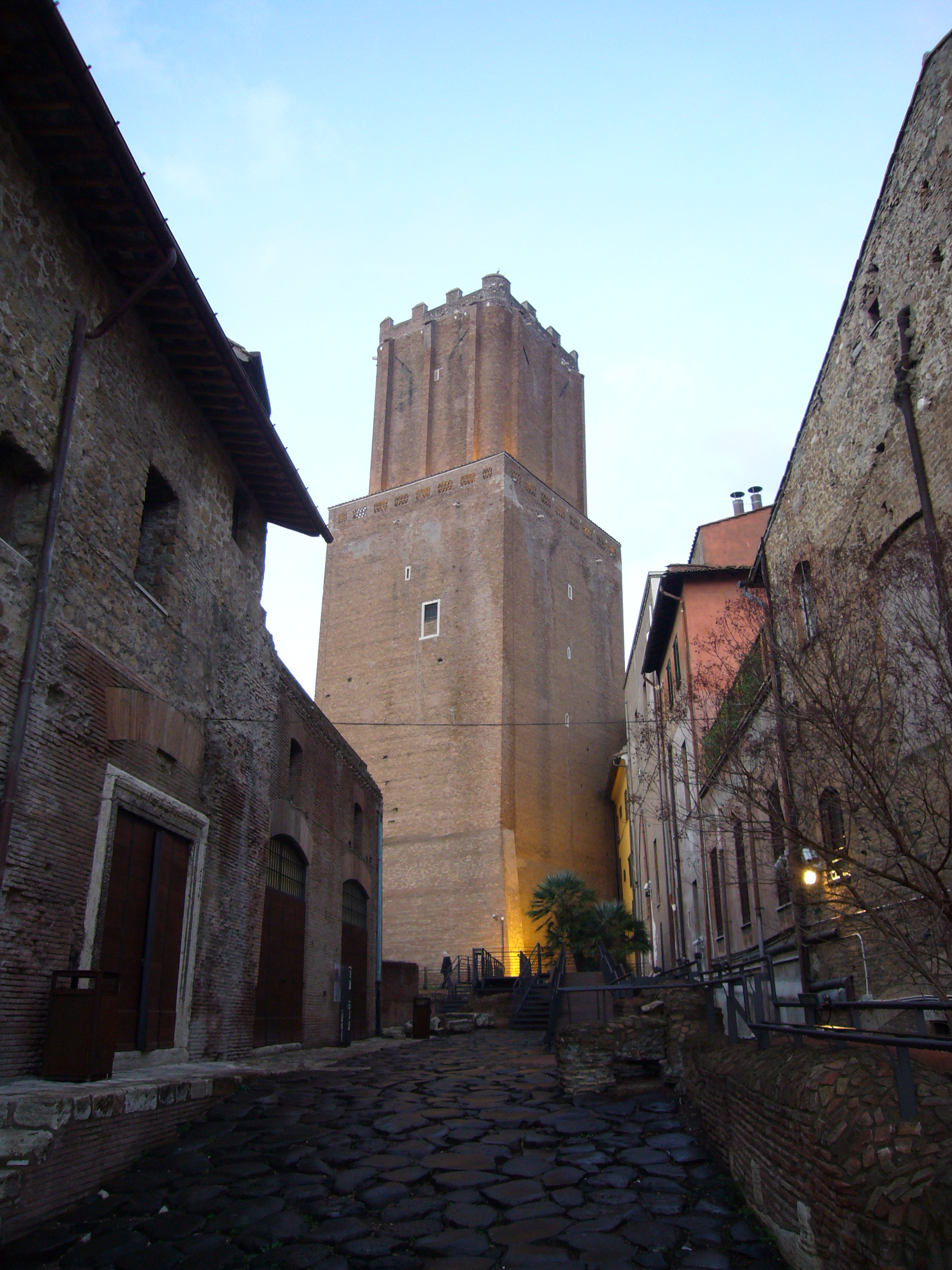 Roma, Torre delle Milizie dai Mercati di Traiano